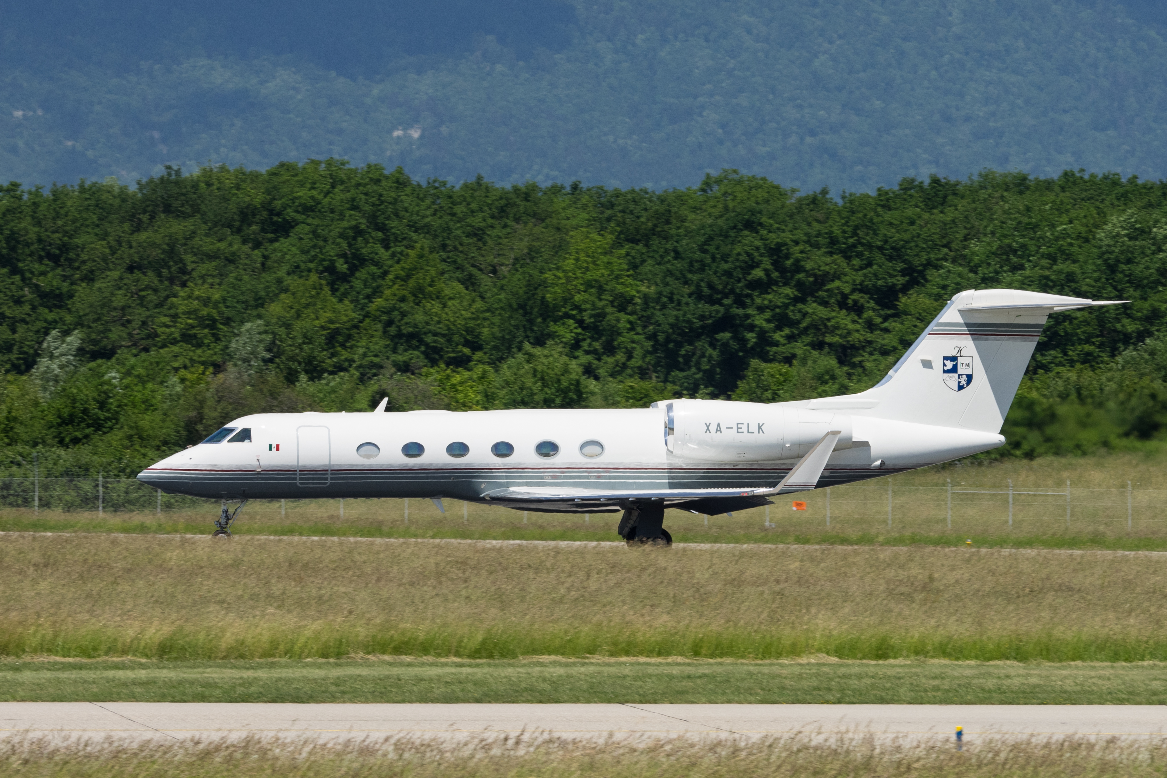 GVA 29.05.2015